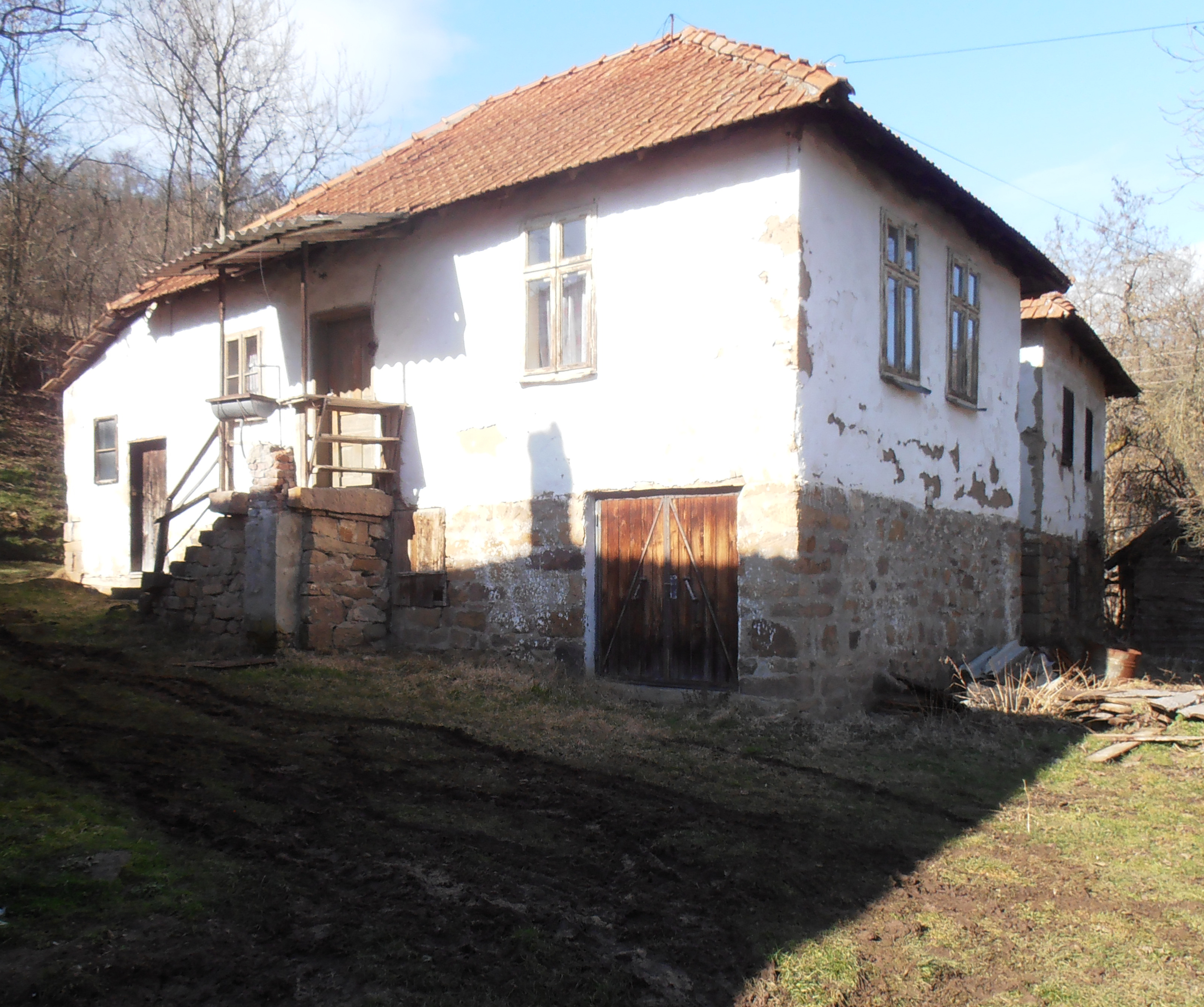 Српски (ћирилица): Дрен, стара сеоска кућа